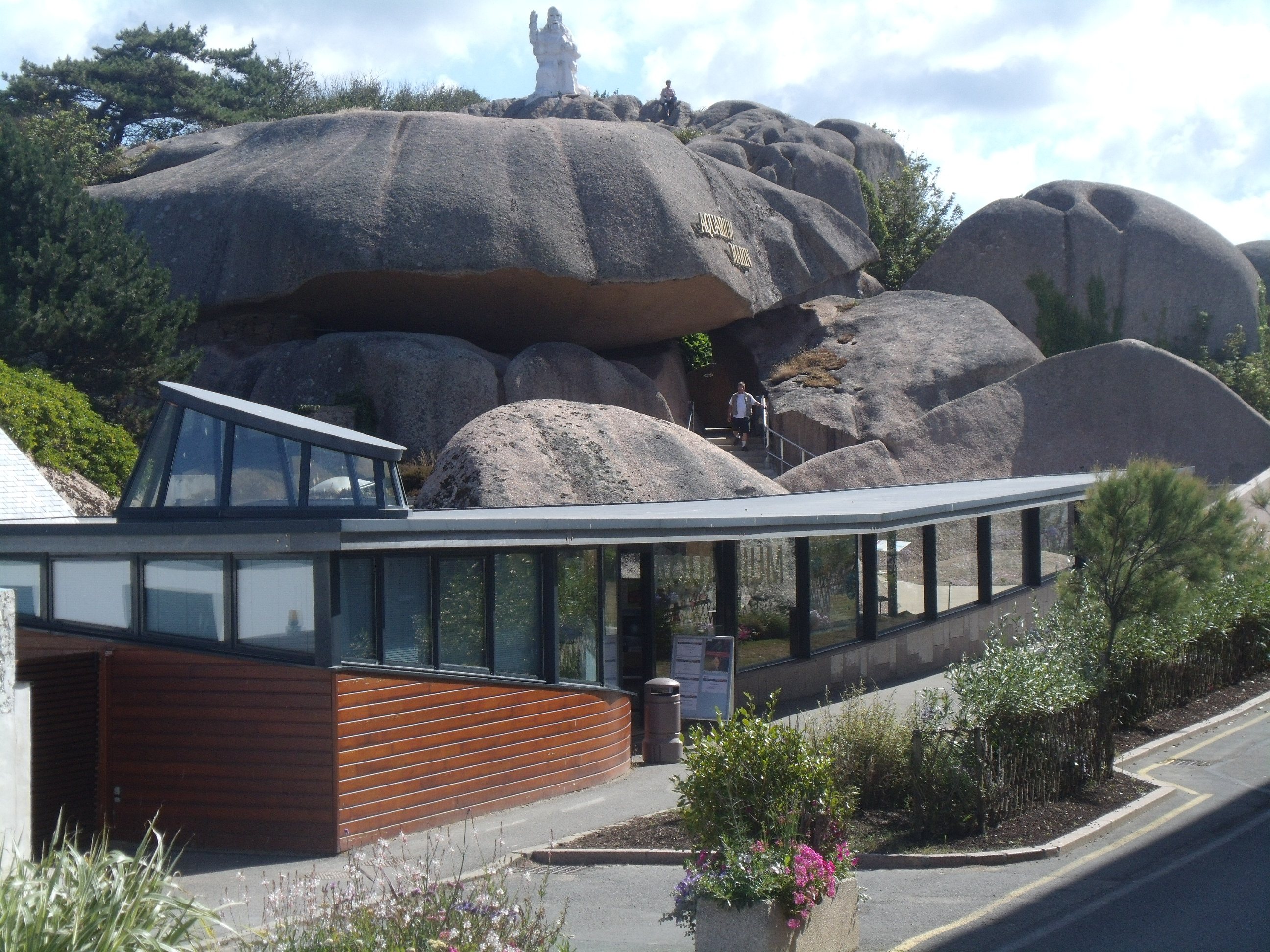 L"aquarium marin boulevard du Coz-Pors